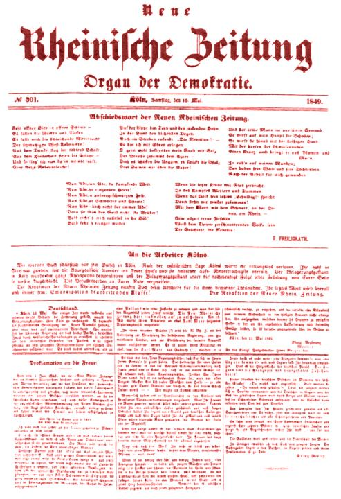 Neue Rheinische Zeitung - Organ der Demokratie vom 18. oder 19. Mai 1849